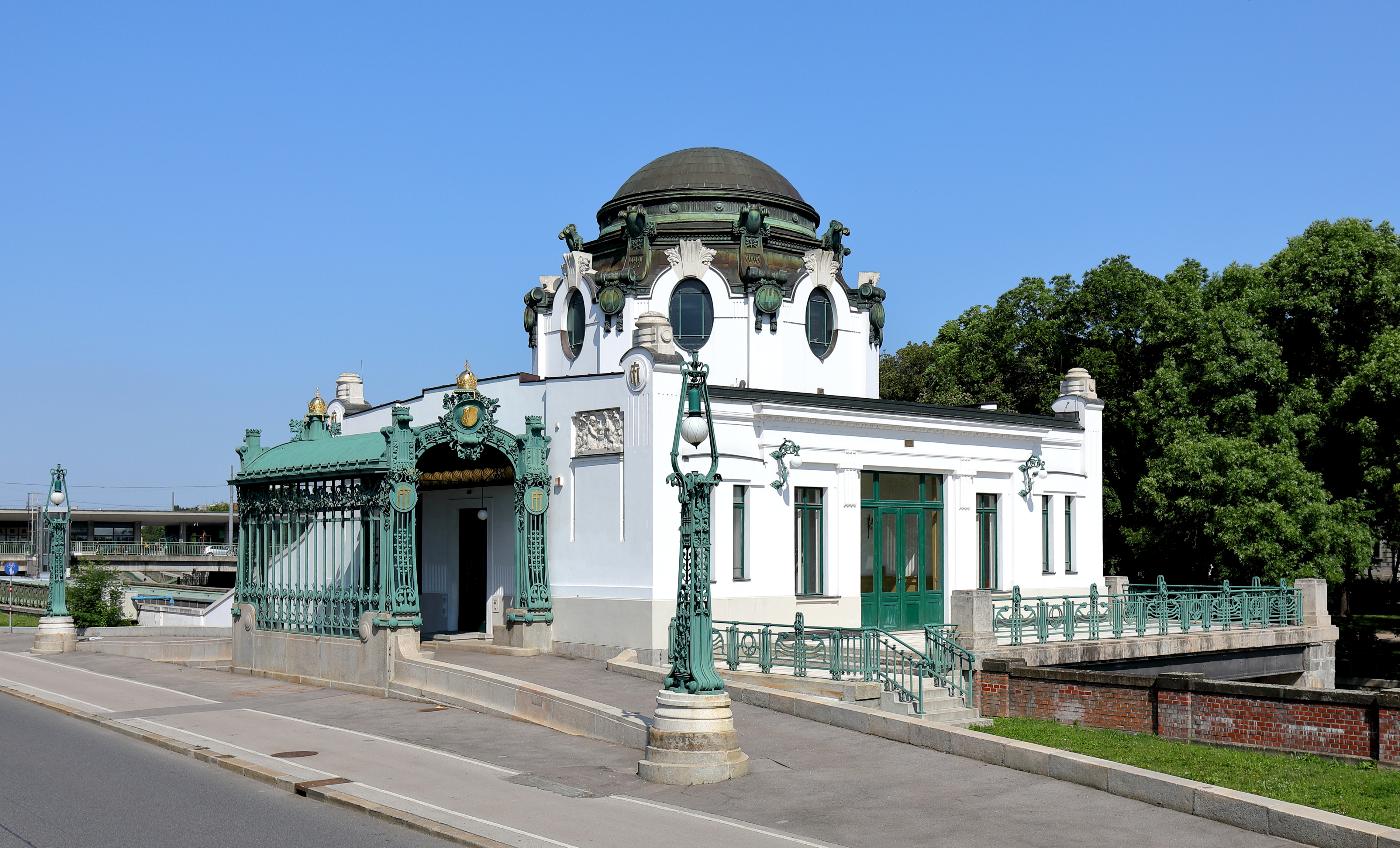 Der Hofpavillon Hietzing im 13. Wiener Gemeindebezirk Hietzing.Der sogenannte Hofpavillon von Otto Wagner war einst ein separates Aufnahmegebäude der Wiener Stadtbahn für den Kaiser und sein Gefolge und ist heute eine Außenstelle des Wien Museums. Er befindet sich knapp 150 Meter flussabwärts der Kennedybrücke bzw. der U-Bahn-Station Hietzing.